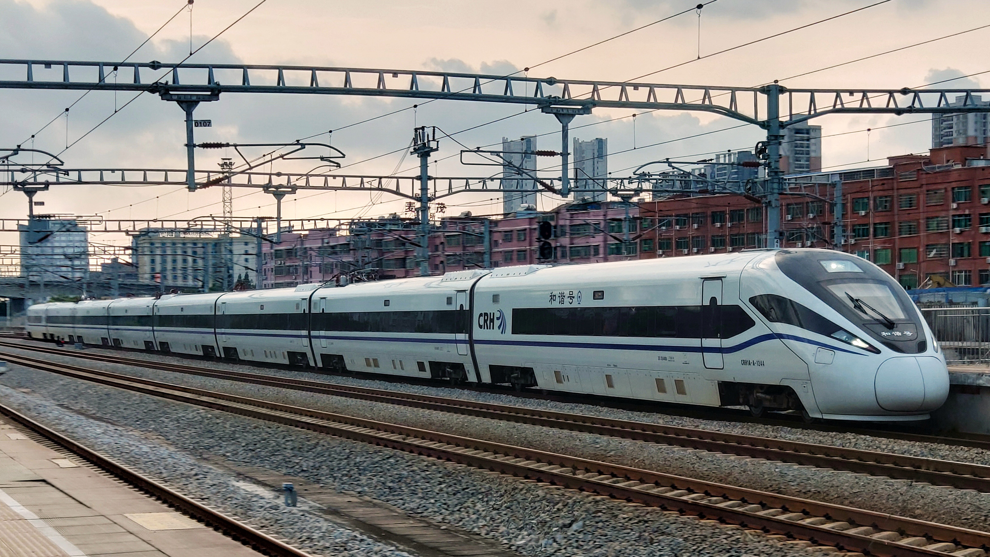 D7128(CRH1A-A)進站茂名站